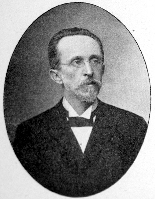 Иван Иванович Боргман - (12 (24) февраля 1849, Санкт-Петербург, Российская империя — 4 (17) мая 1914, там же) — русский физик, с 1888 года профессор Санкт-Петербургского университета.